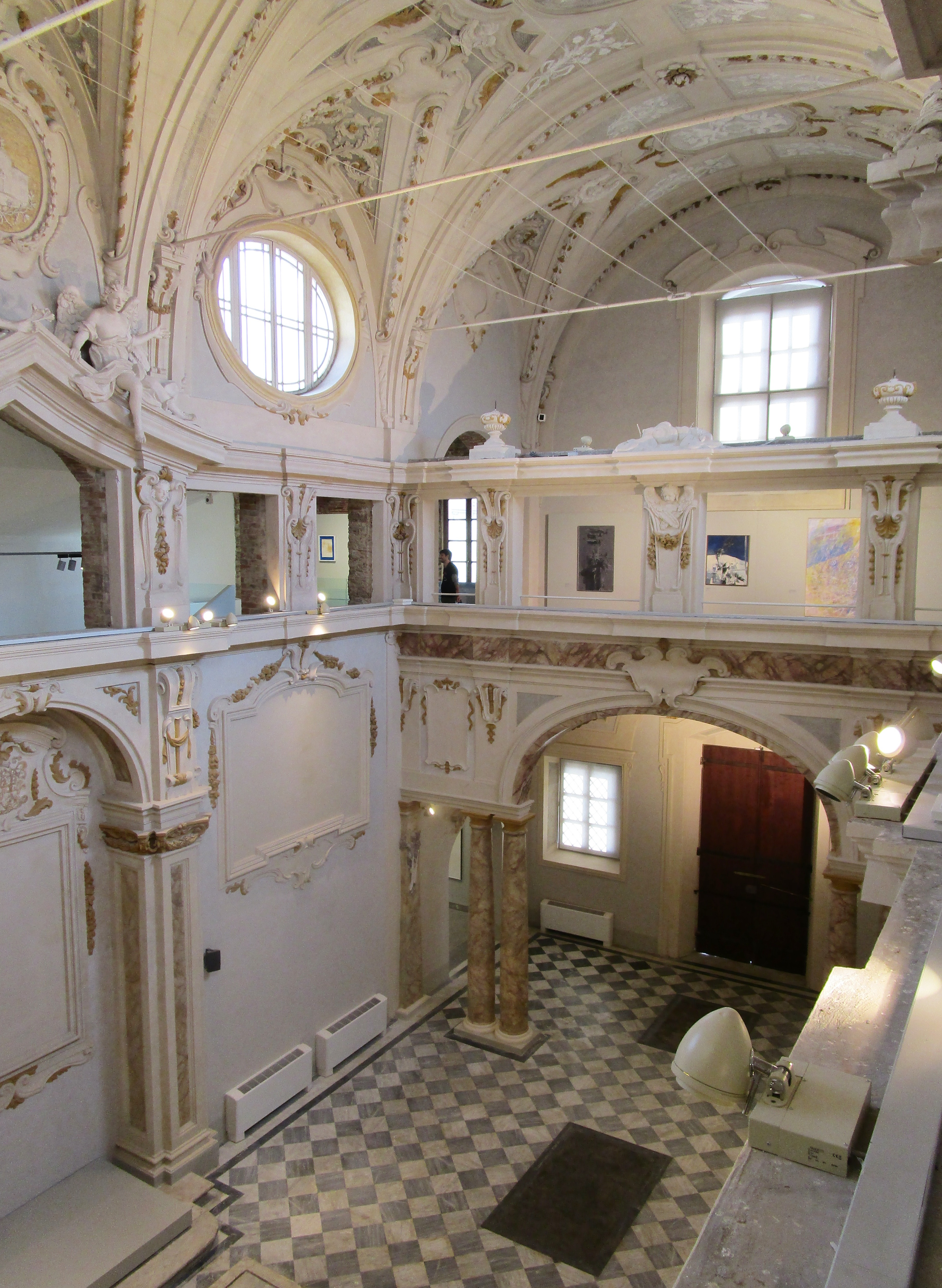 Livorno, chiesa del Luogo Pio, facente parte del Museo della Città.